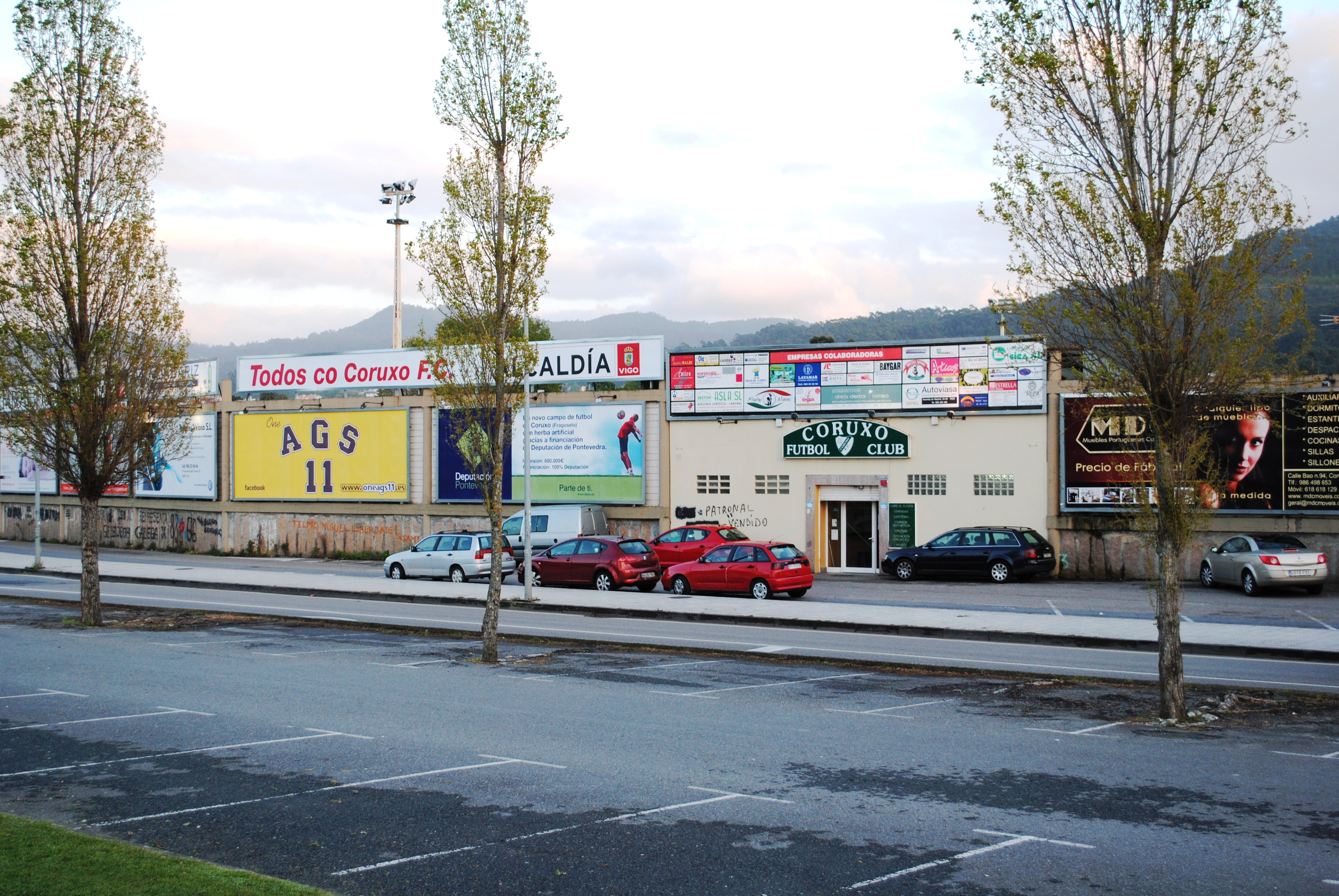 Campo do Vao, F C Coruxo, Vigo